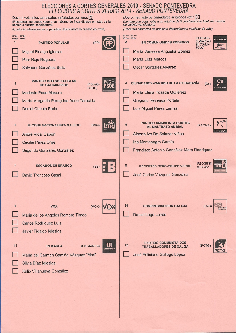 Papeleta para o Senado nas Eleccións xerais de abril de 2019 da circunscrición electoral de Pontevedra.